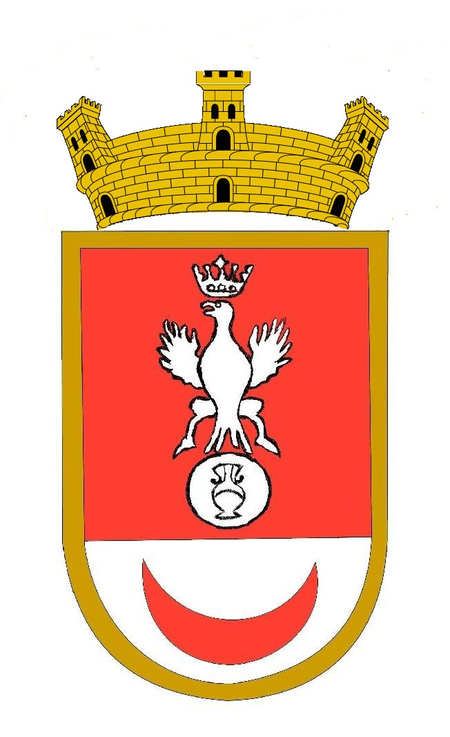 Escudo ( propuesta) de Navamorales ( Salamanca)